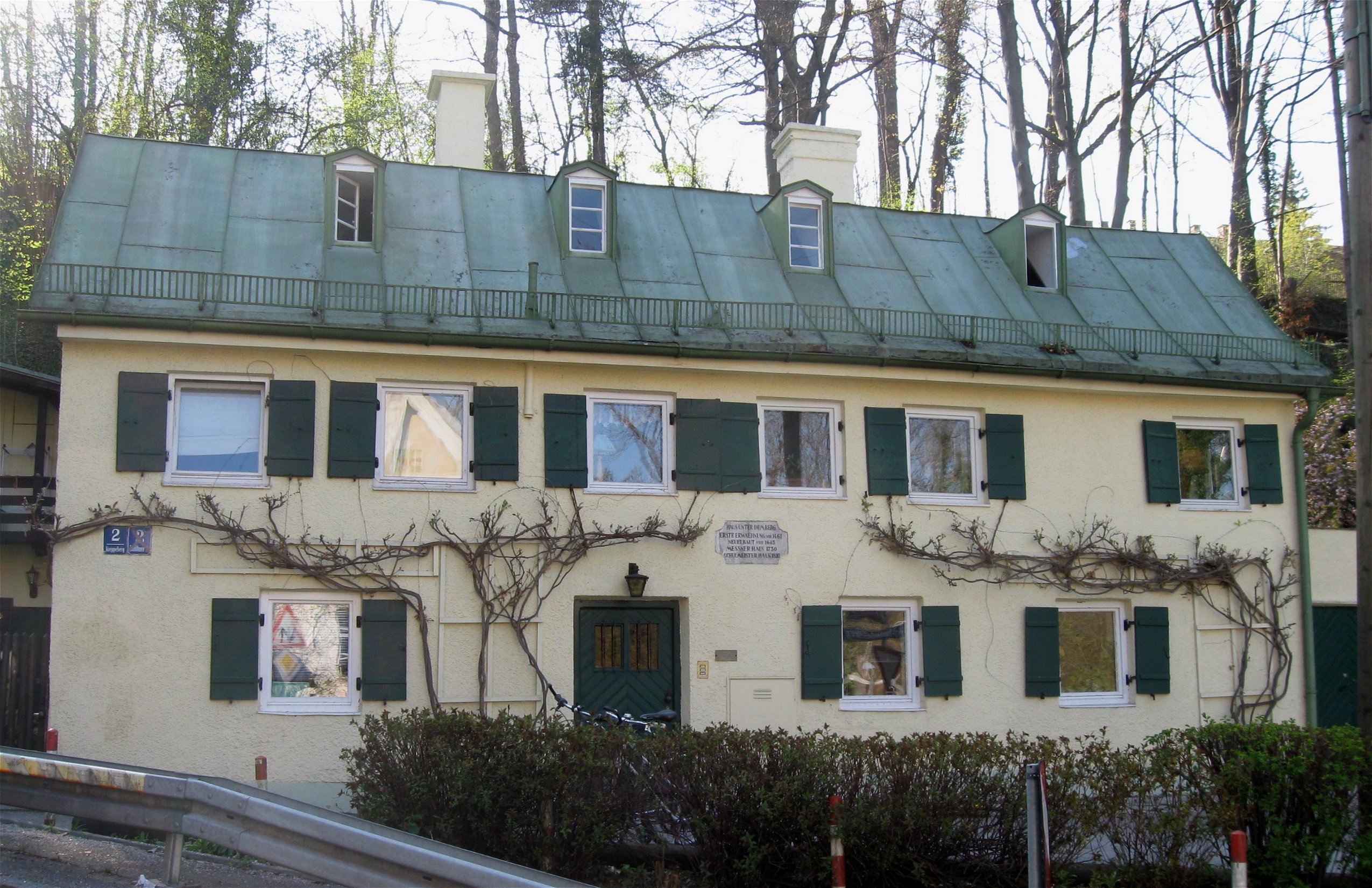 Kreppeberg 2; Kleinhaus, mit Blechdach und hohen Gauben, im Kern 18. Jh.. München